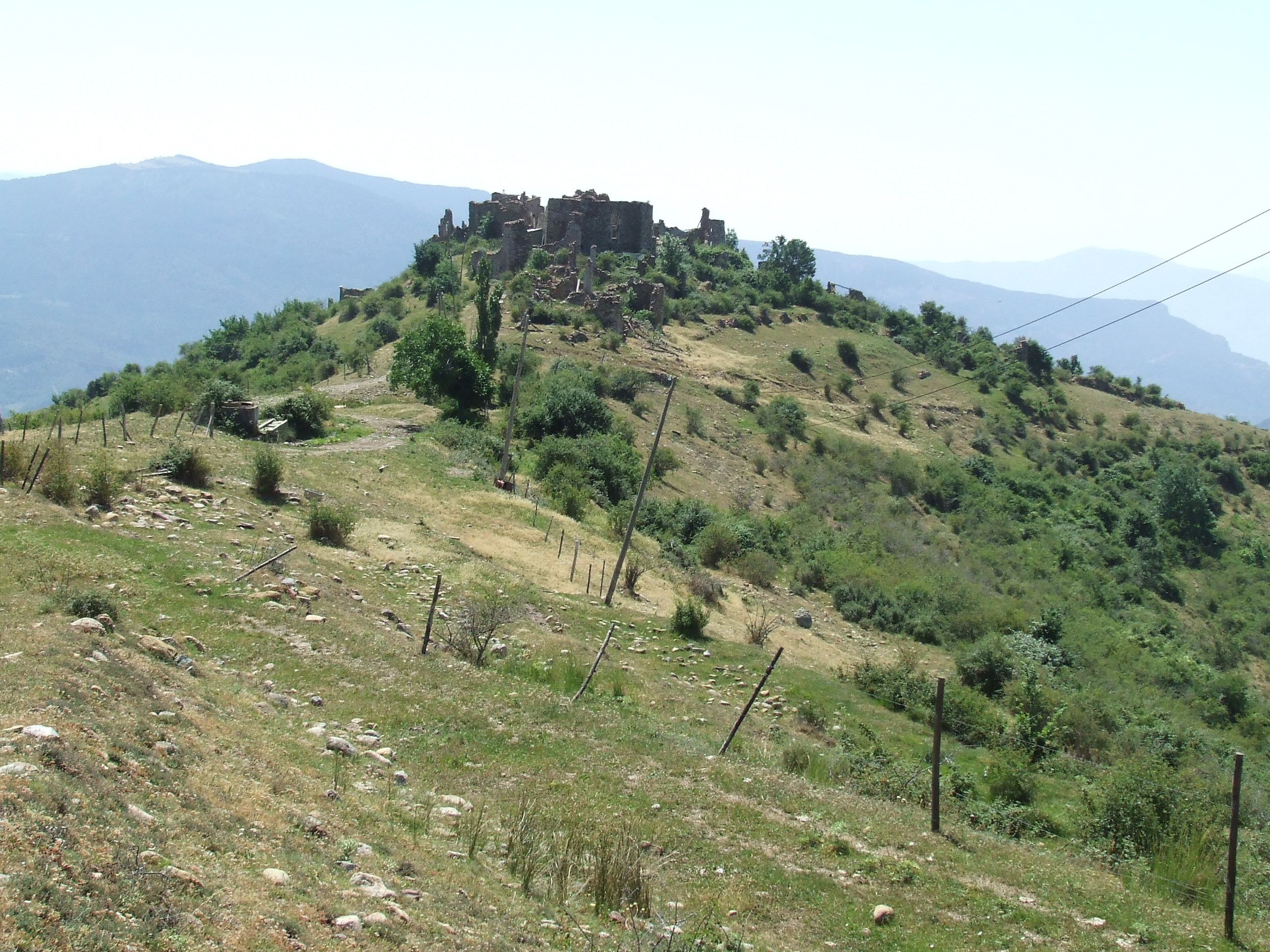 La Bastida de Bellera damunt del seu turó (Sarroca de Bellera, Pallars Jussà)